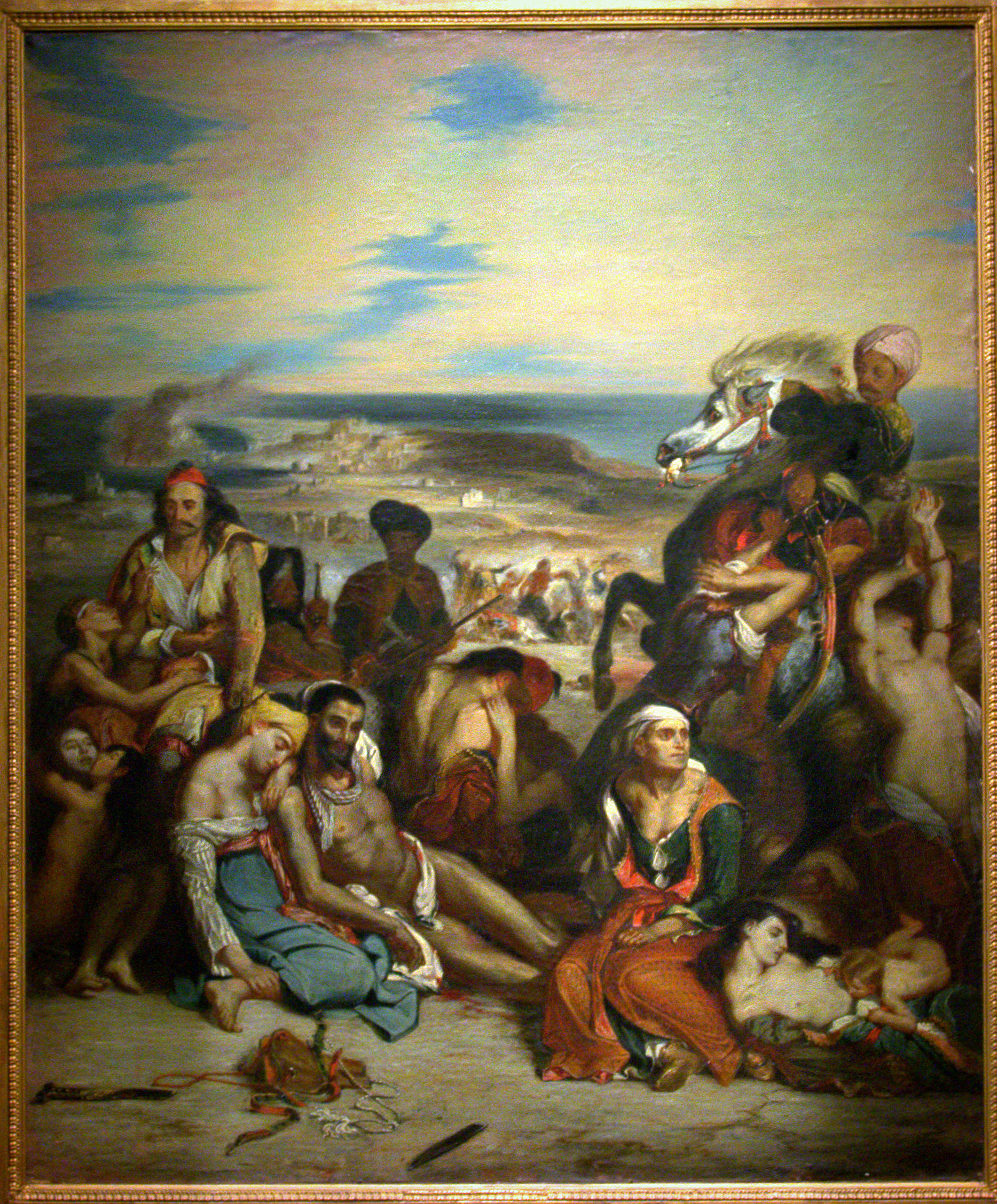 A copy of the famous painting of Delacroix made in his studio by his pupil Pierre Andrieu (1821-1892). Hellenic War Museum (Athens, Greece). --- Η σφαγή της Χίου. Αντίγραφον του ομωνύμου έργου του E. Deiaxroix φιλοτεχνηθέν από τον μαθητής του Pierre Andrieu (1821-1892). Πολεμικό Μουσείο Ελλάδος. Αθήνα.